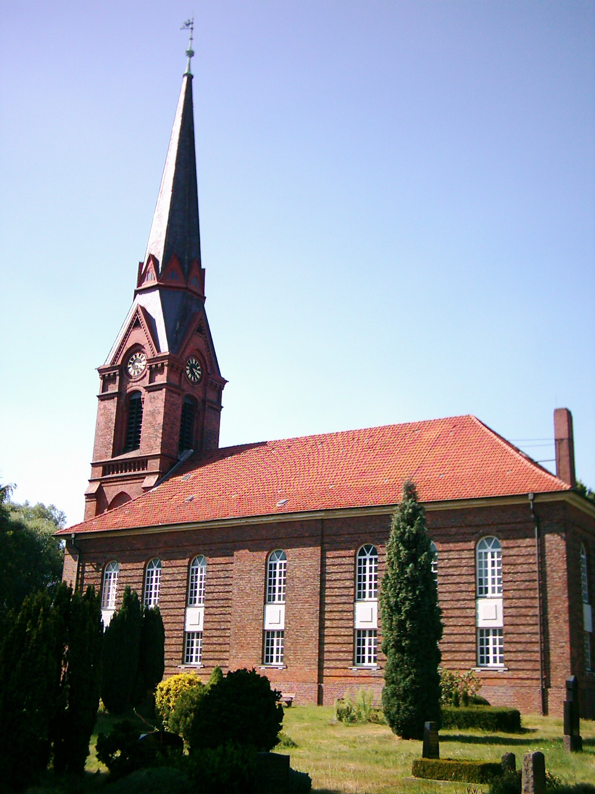 Die Kirche St. Gertrud in Hamburg-Altenwerder. This is a photograph of an architectural monument.